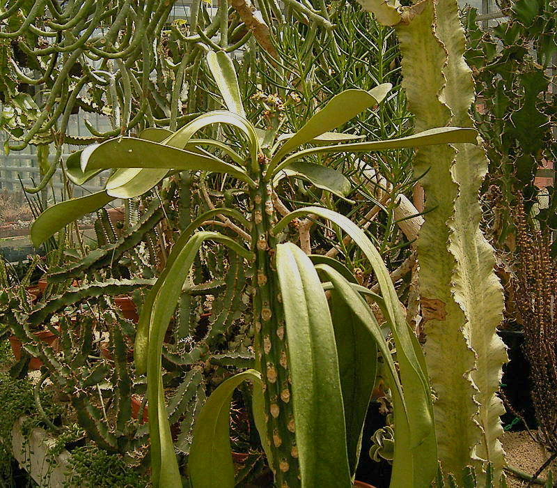 Euphorbia drupifera BG Bochum, Germany